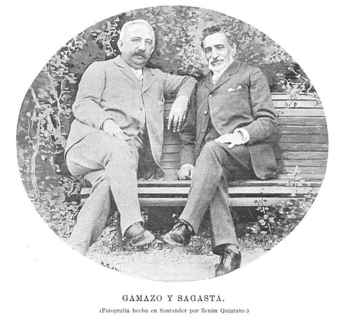 Fotografía de Germán Gamazo y Sagasta